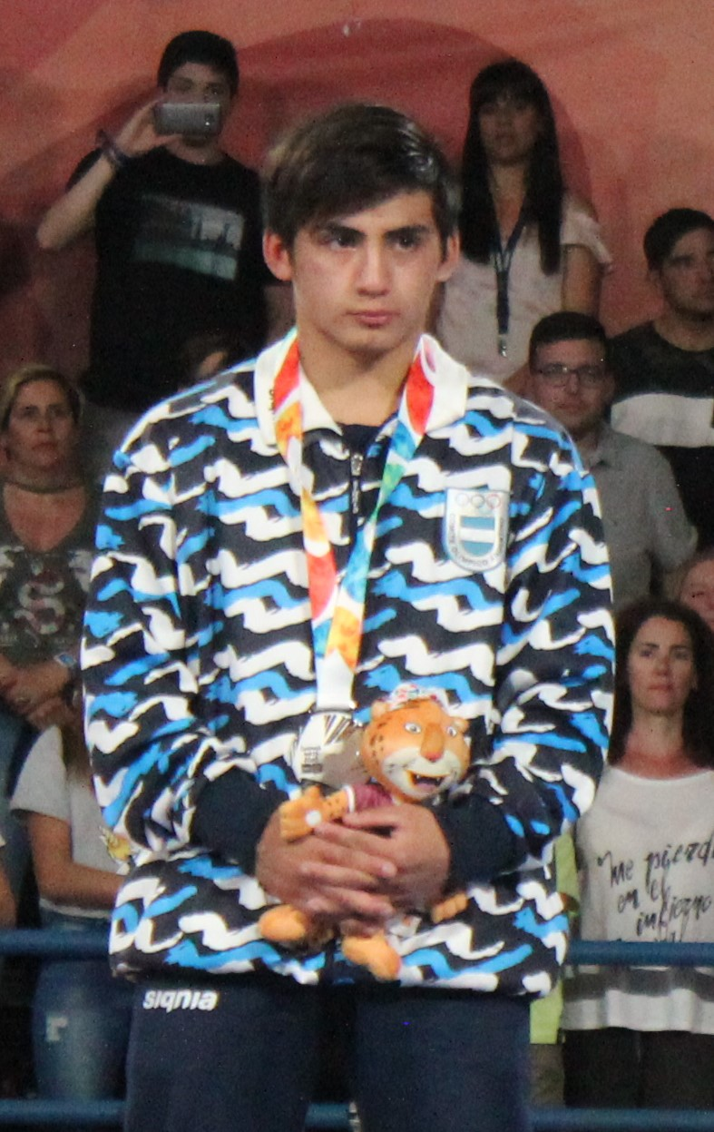 Hernán David Almendra en los JJOO de la Juventud Buenos Aires 201